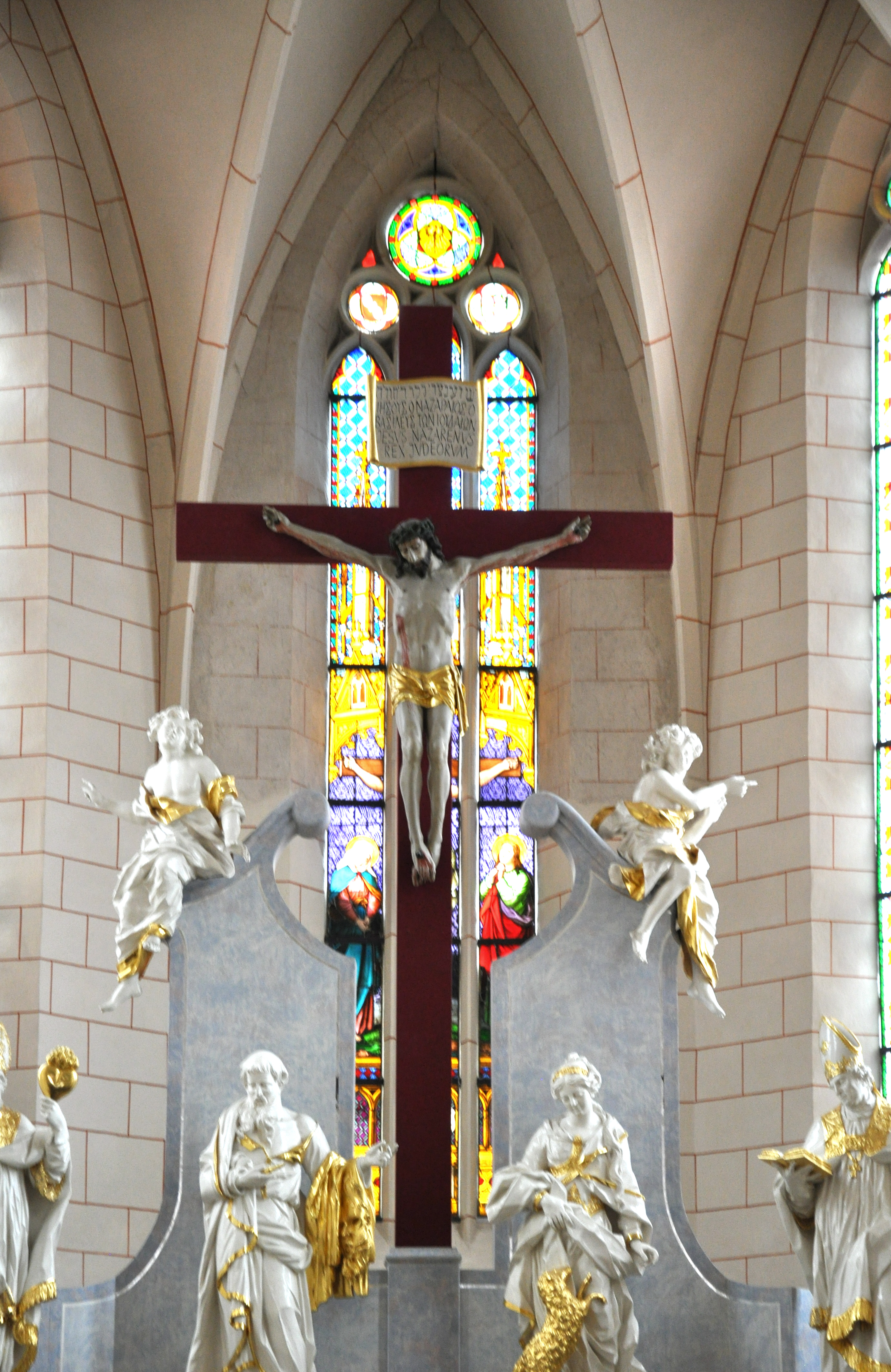 Oppenheim, Katholische Pfarrkirche St. Bartholomäus, Kruzifix über dem Tabernakel